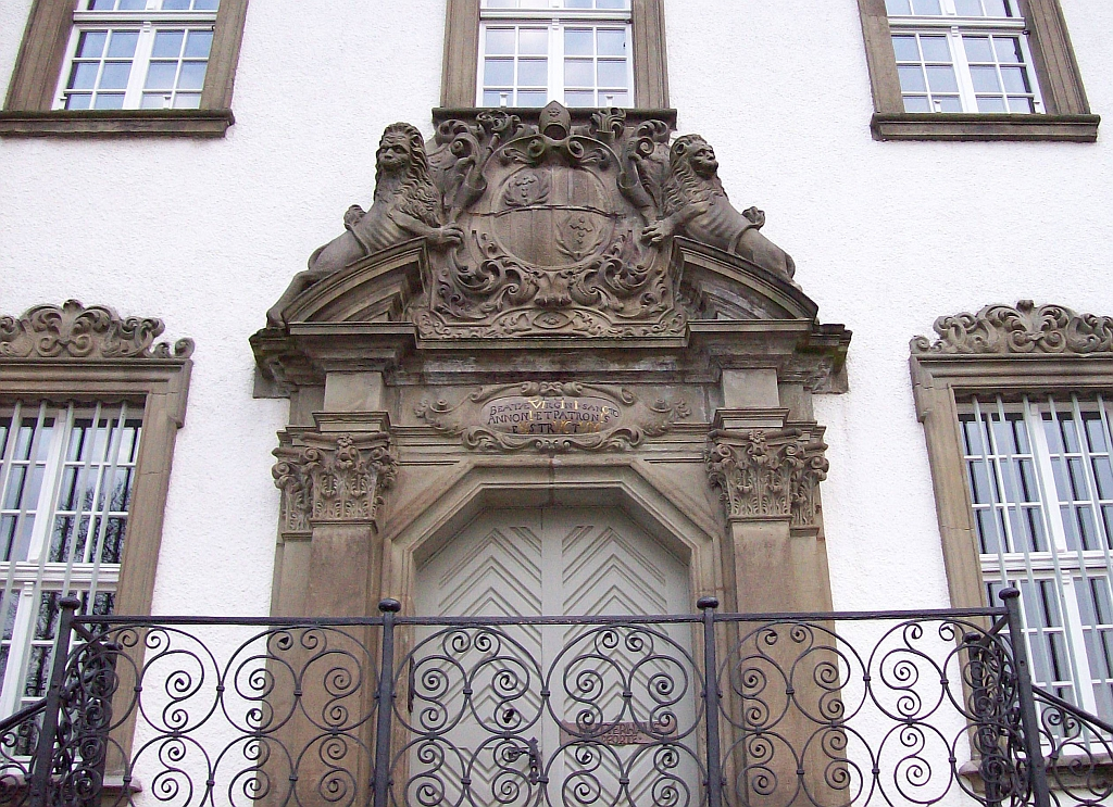 Kloster Grafschaft bei Schmallenberg (Germany)